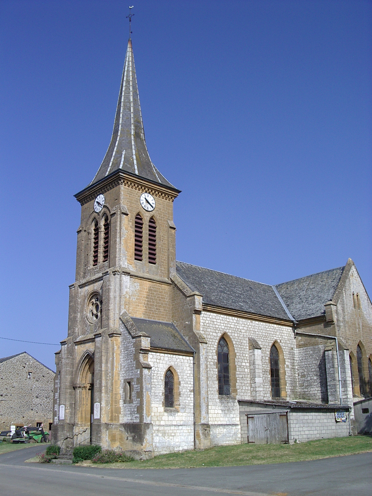 Neufmaison est une commune française, située dans le département des Ardennes et la région Champagne-Ardenne : Eglise